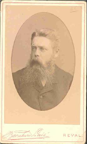 "Tundmatu mehe rindportree ovaalis"